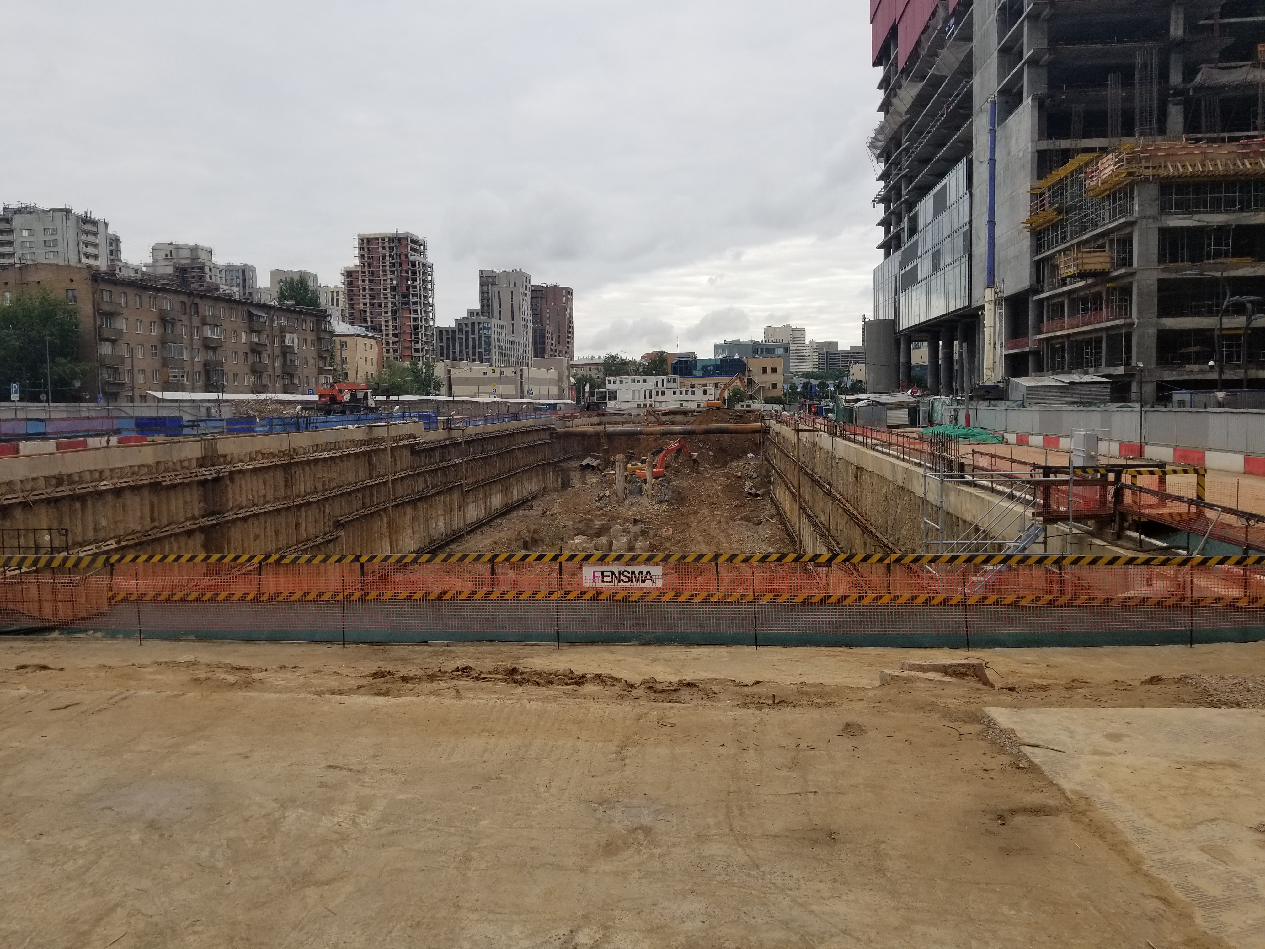 Строительство One Tower в Москве (июль 2020)